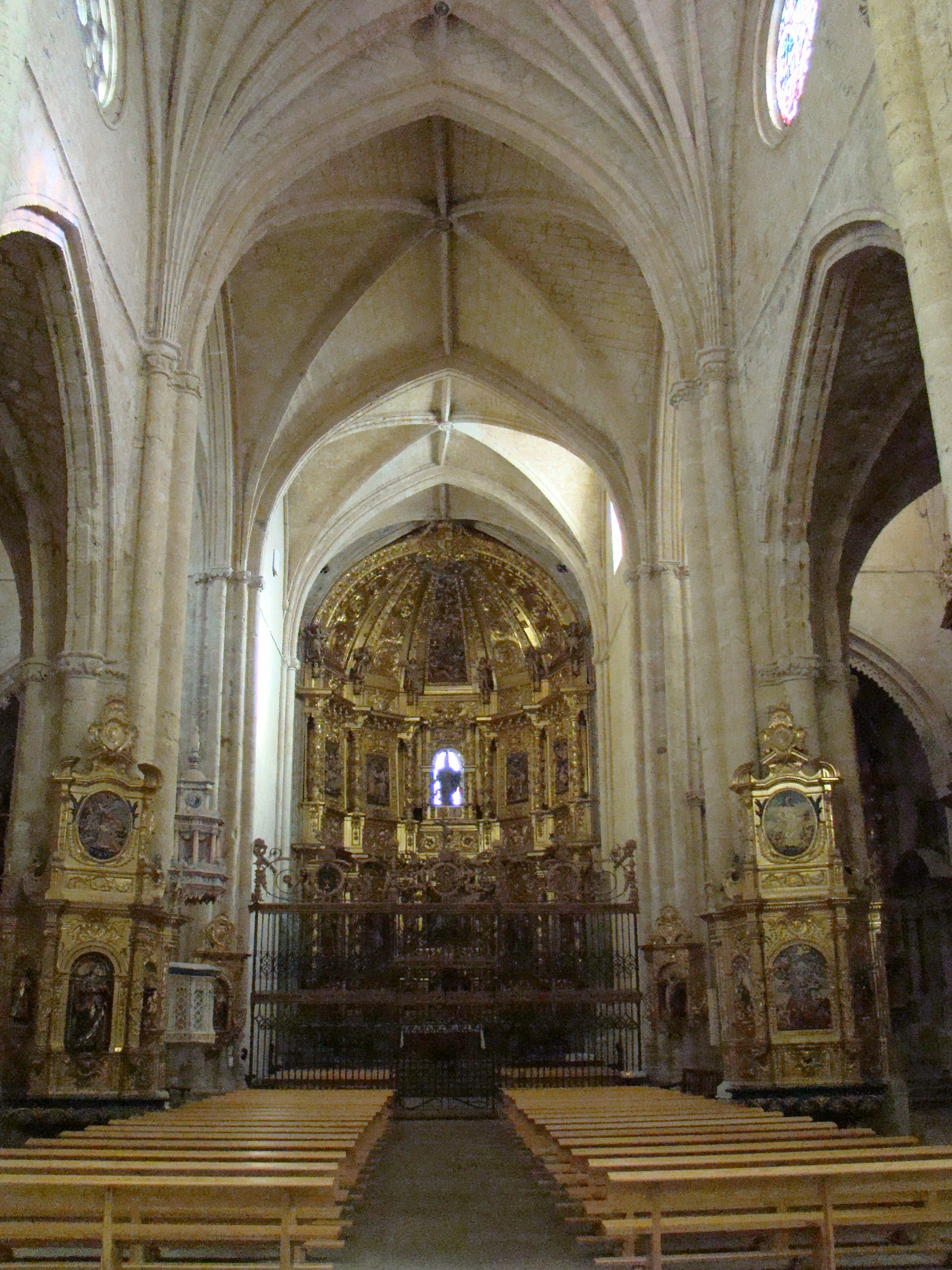 Iglesia de San Hipólito en Támara de Campos (Palencia, España). Nave central con el retablo mayor al fondo y bóvedas de crucería simple.